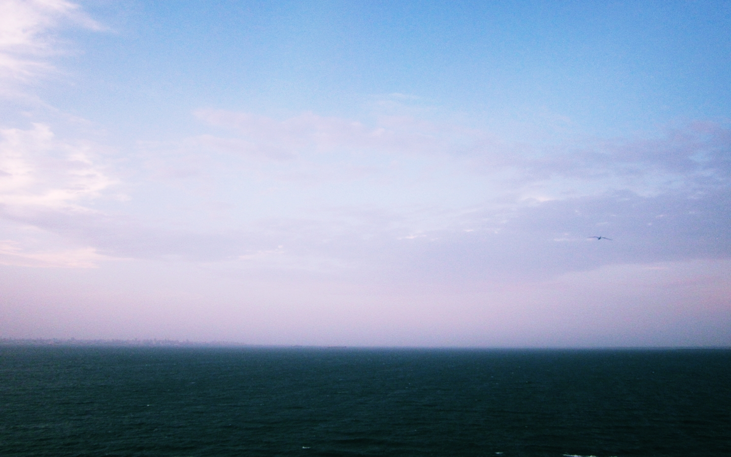 Esta imagen fue tomada mientras regresaba de un viaje.